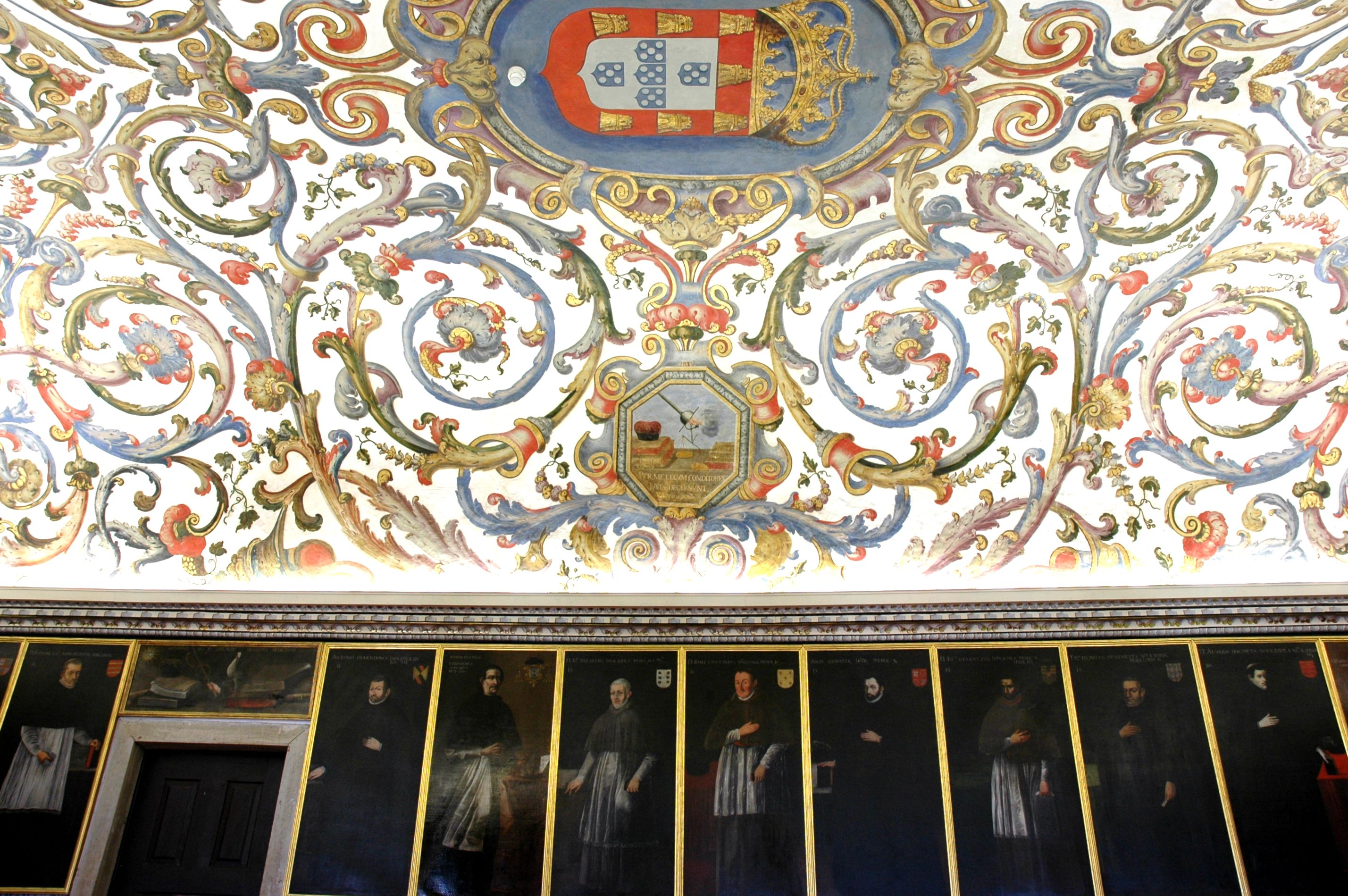 Universitat de Coïmbra - Sala dels exàmens privats - Sala dos Exames Privados